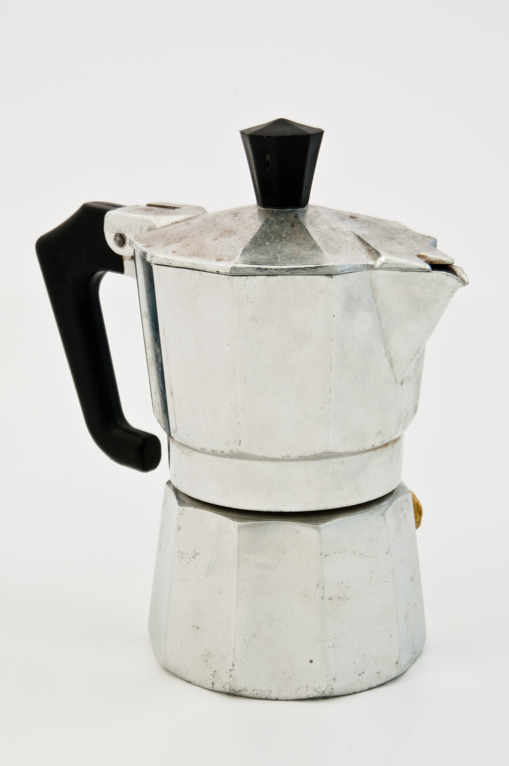 Aus dem Bestand des Museums für Hamburgische Geschichte